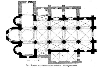 Plan de l'église publié dans "L'architecture religieuse à l'époque romane dans l'ancien diocèse du Puy" gravures ou héliogravures exécutées sous la direction de Félix Thiollier, Impr. R. Marchessou Le Puy 1900.